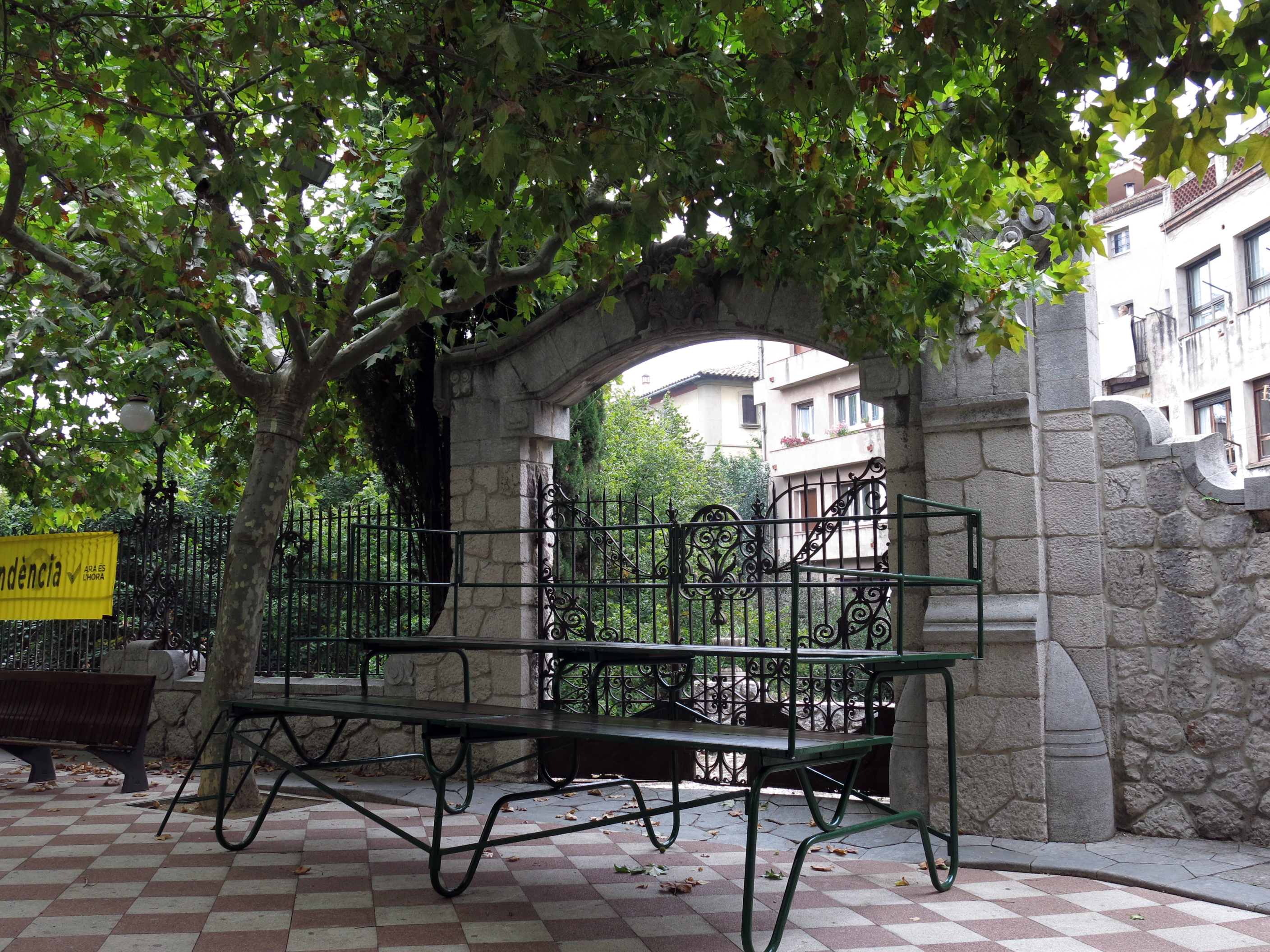 Portal dels jardins de Can Pratmarsó, al Passeig (Centelles)